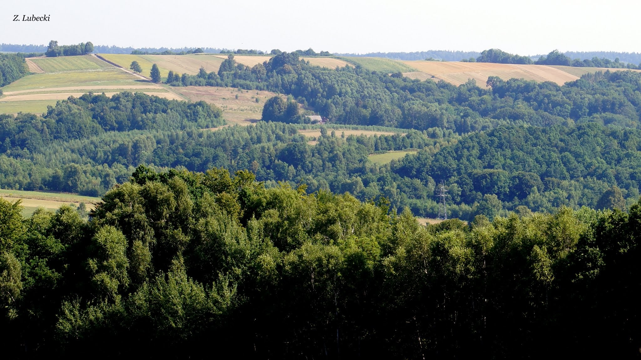 Harta "Wysoka" i las "Boginki"